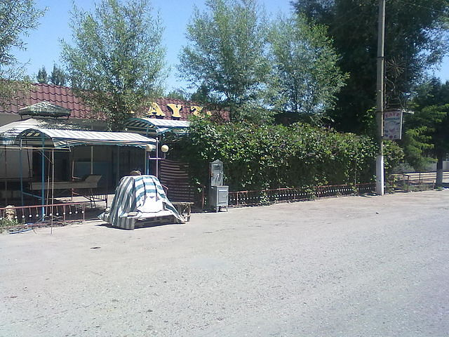 КАФЕ ФАЙЗ ГОРОД ДАРДАК